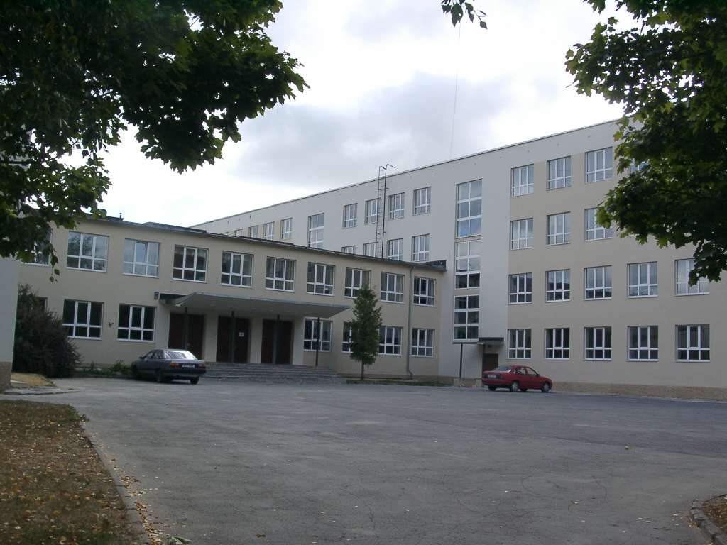 Jõhvi Gümnaasiumi peasissepääs